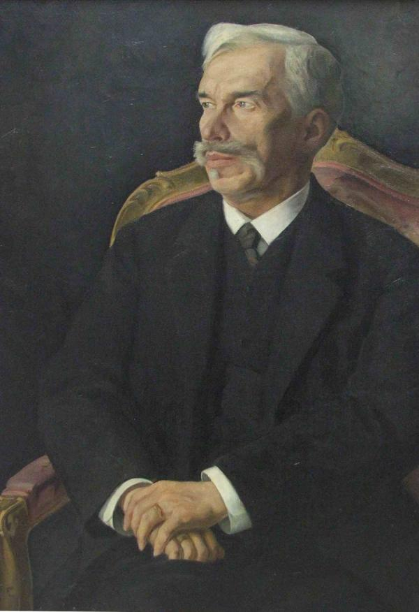 Сергей Иванович Щукин. 1915. Портрет работы Дмитрия Мельникова